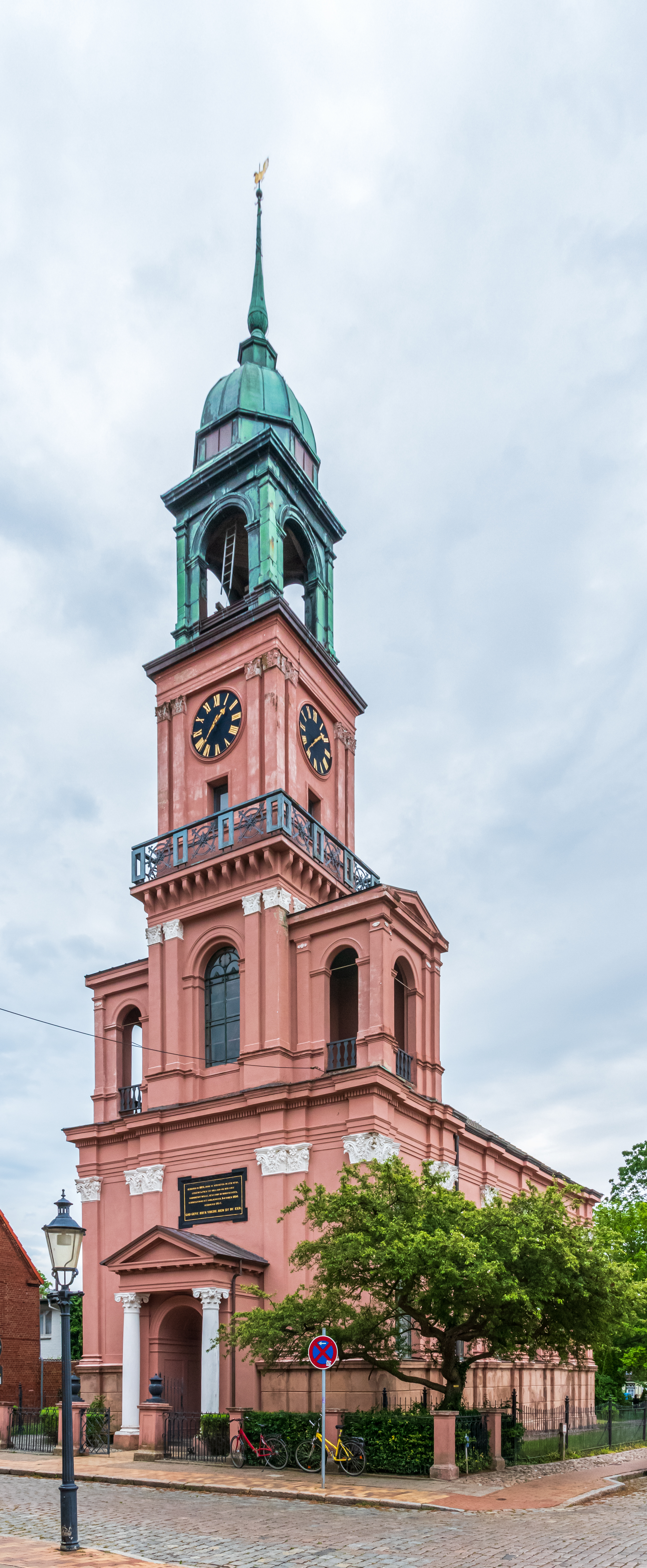 Die Remonstrantisch-Reformierte Kirche von Friedrichstadt